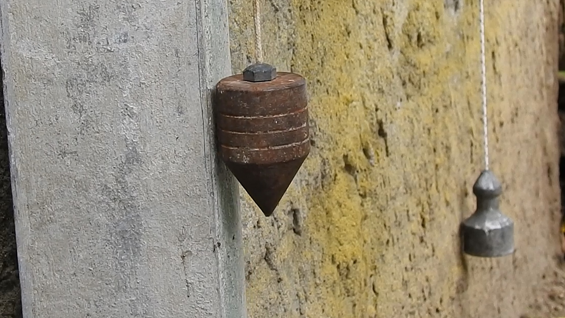 Uso de plomada de albañil